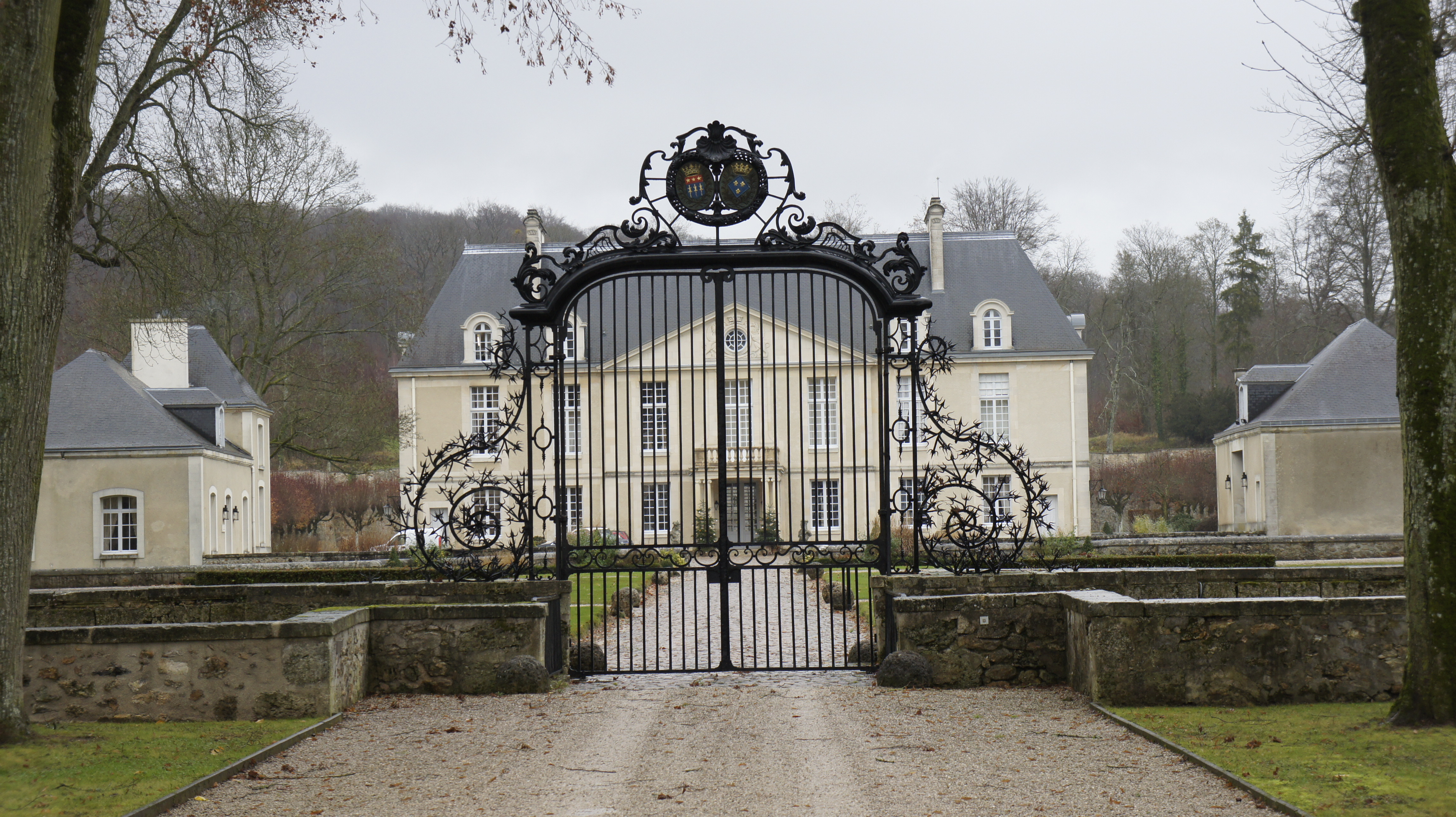 Entrée et allée du château de Louvois et armoiries.